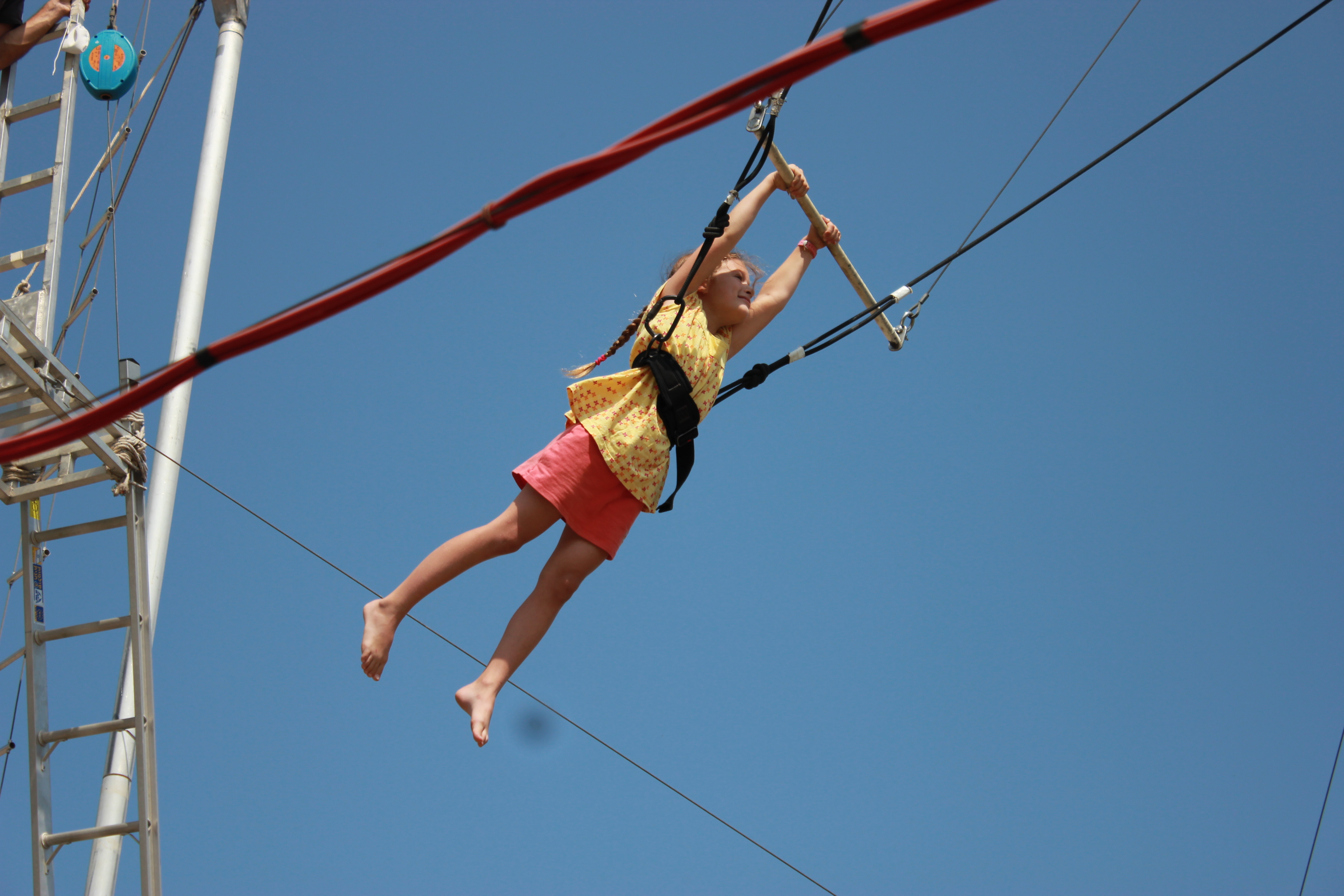 אימון ילדים בטרפז המעופף בקרקס פלורנטין - בית הספר לקרקס בכפר הירוק